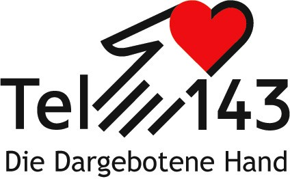 Dargebotene Hand, Telefon 143, Telefonseelsorge Schweiz, Logo. Im Auftrag der Dargebotenen Hand.